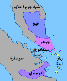 تقسيم سلطنة جوهر قبل وبعد المعاهدة الأنجلو هولندية لعام 1824